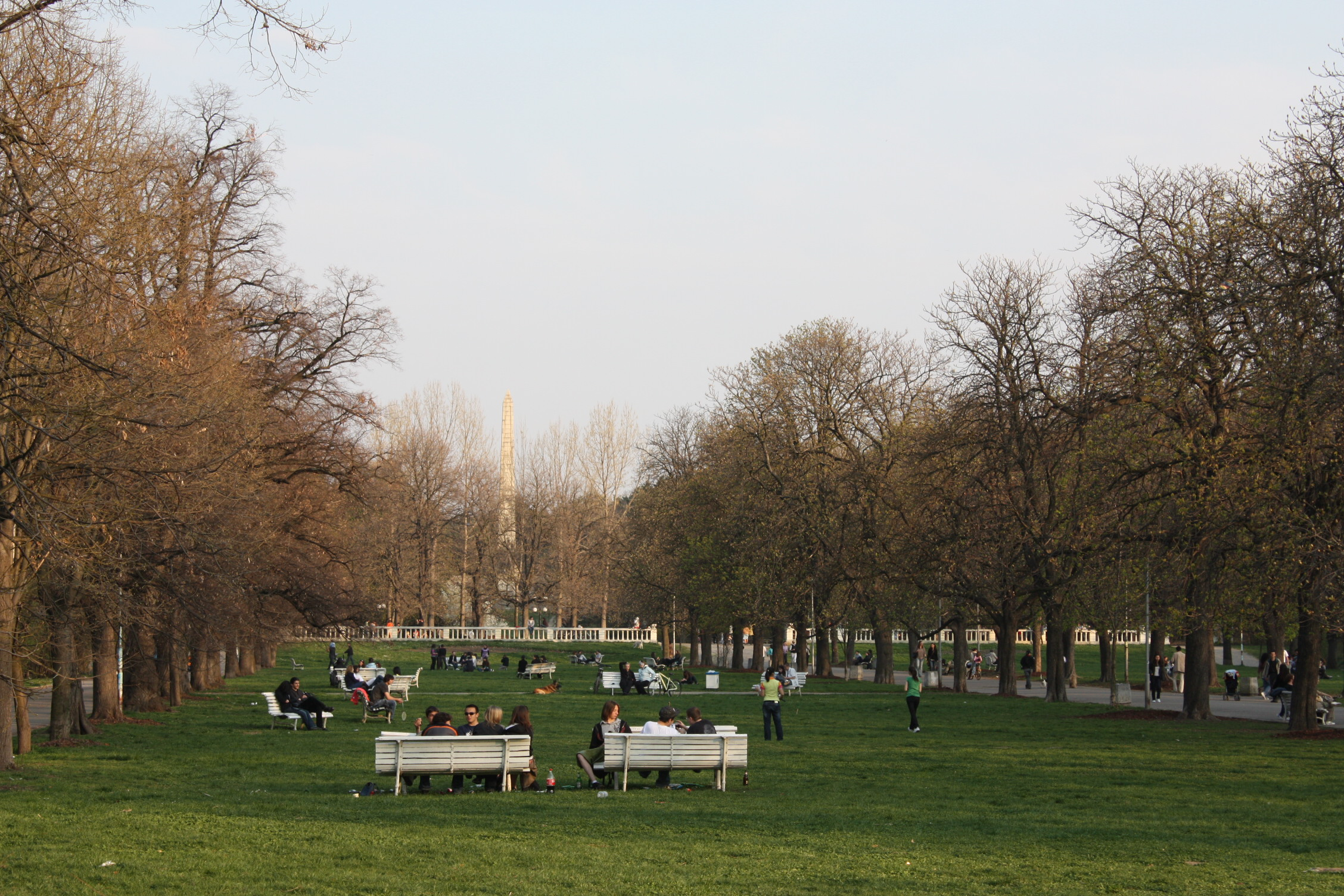 Borisova gradina, Борисова градина, Bulgaria